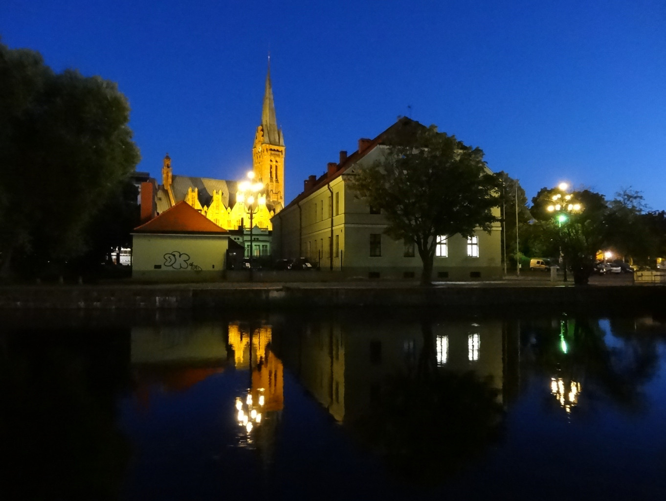 Budynek przy ul. Grodzkiej 25 w Bydgoszczy - dawny bud. administracyjny rafinerii cukru trzcinowego, zbud. w końcu XVIII w. nad Brdą